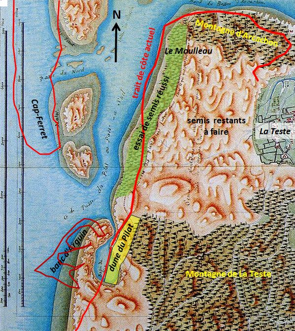 Carte annotée avec le trait de côte actuel (source Géoportail)